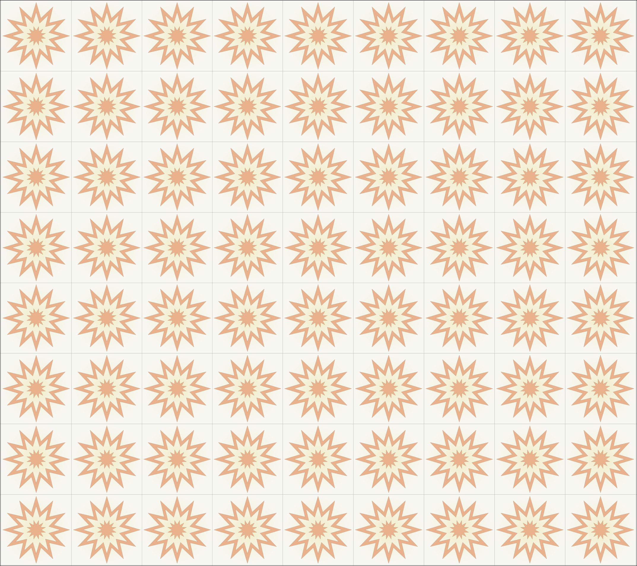 El gráfico representa un lienzo cubierto de azulejos. El dibujo se ha realizado con Inkscape 0.45.1. Usando las herramienta estrella y combinando un par de ellas para conseguir un relleno. El fondo de cada azulejo se ha generado con un gradiente de color circular. Posteriormente el objeto creado se ha usado como patrón de relleno de un rectángulo para conseguir un efecto de alicatado virtual.